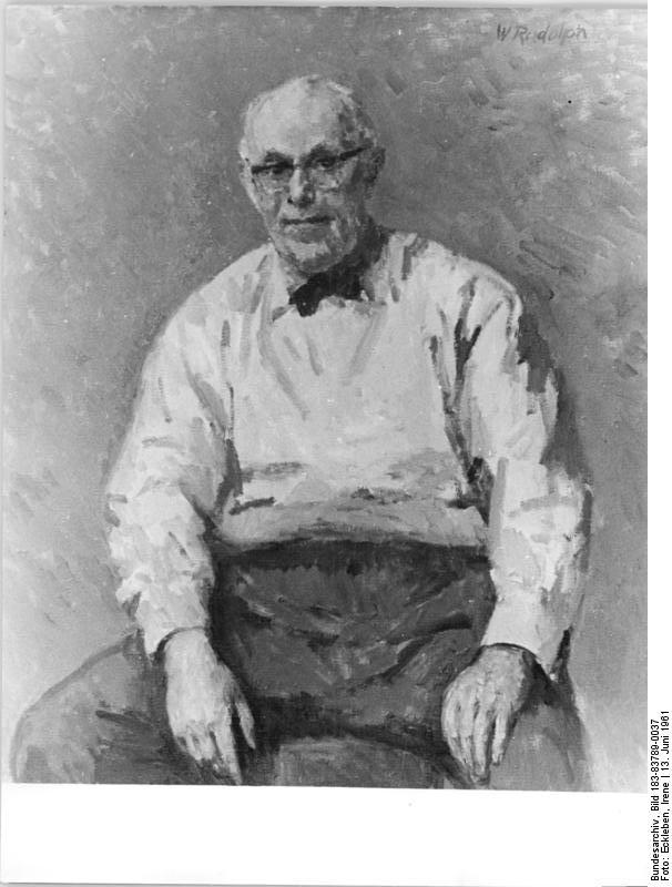 "Prof. Heinz Bongartz" von Wilhelm Rudolph Zentralbild Eckleben 13.6.1961 3. Arbeiterfestspiele des FDGB. Kunstausstellung der 3. Arbeiterfestspiele in Magdeburg. Im Kulturhistorischen Museum wurde am 10. Juni 1961 die Kunstausstellung des FDGB eröffnet. UBz: "Prof. Heinz Bongartz", Öl von Wilhelm Rudolph.